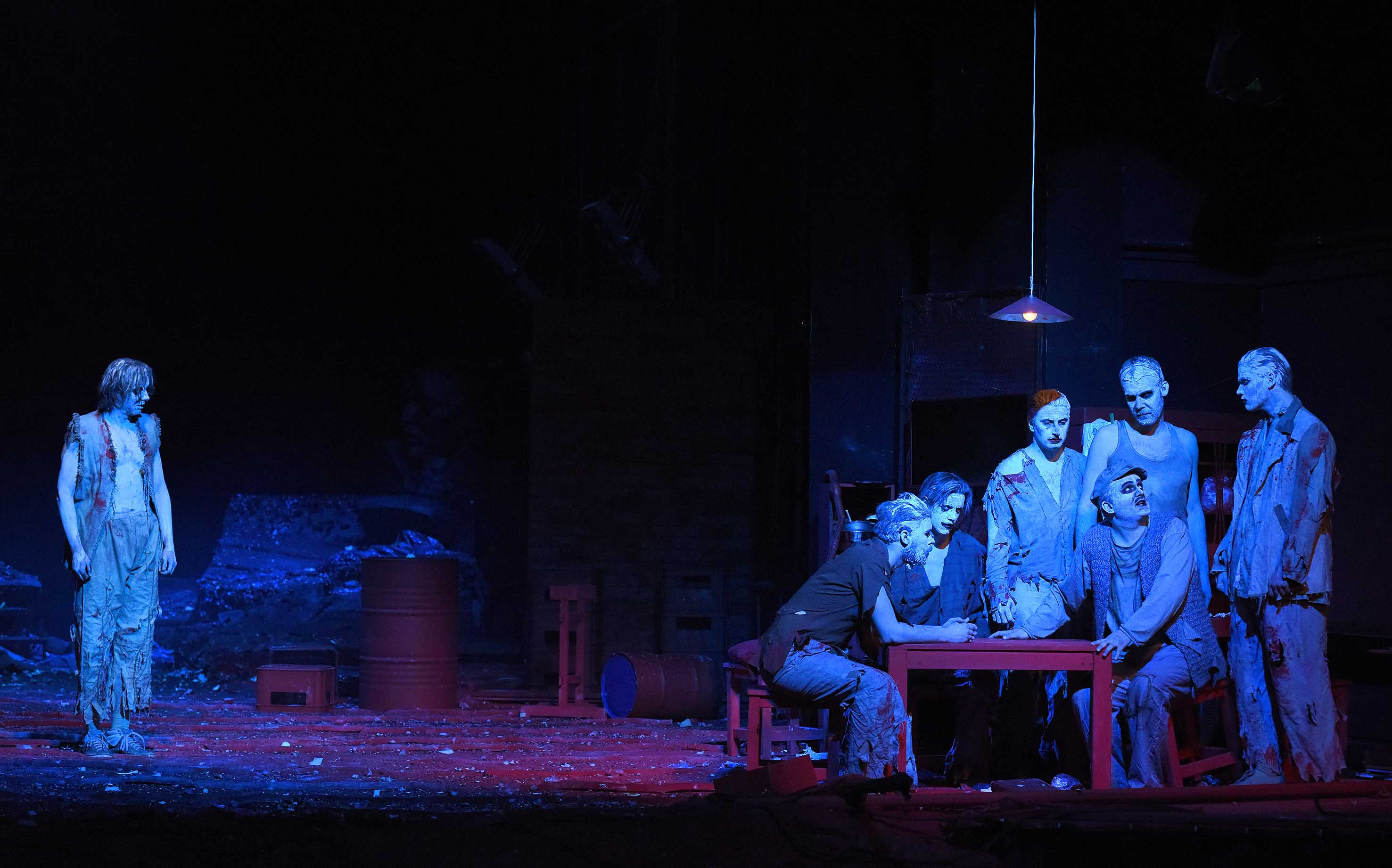 Fotografija iz predstave Dvesta